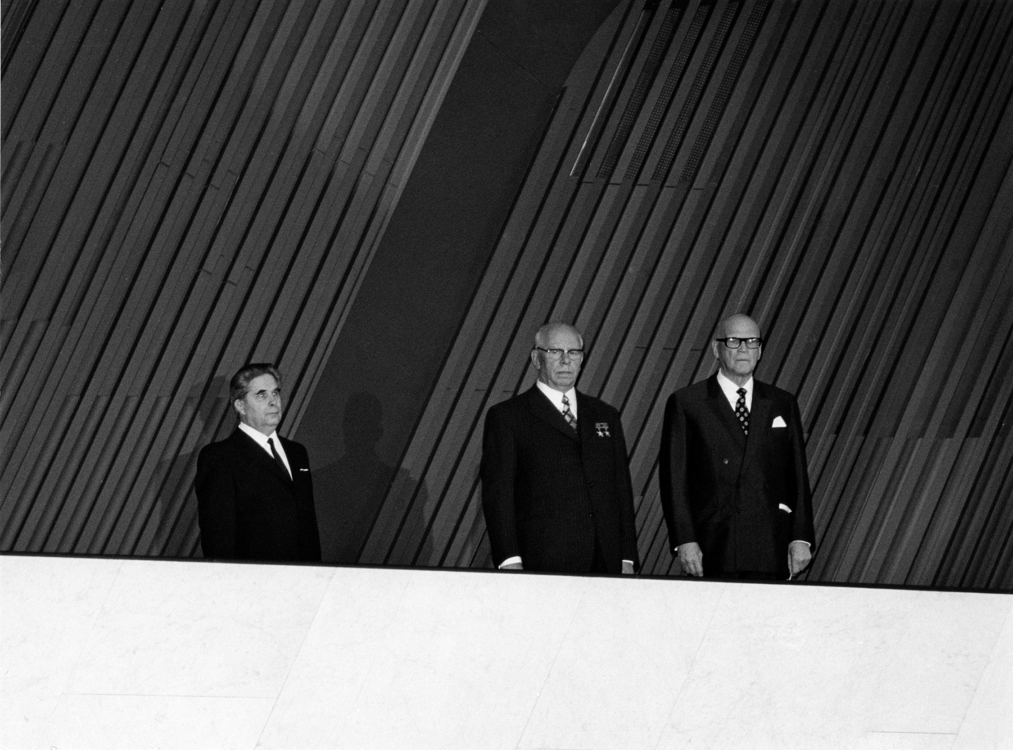 Ystävyys-, yhteistyö- ja avunantosopimuksen allekirjoitus Finlandia-talossa. Kuvassa Neuvostoliiton ja Suomen presidentit Nikolai Viktorovitš Podgornyi ja Urho Kaleva Kekkonen.